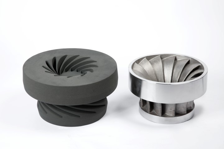 Sanddruckteil und fertig gegossenes Laufrad (Additive Serienfertigung)